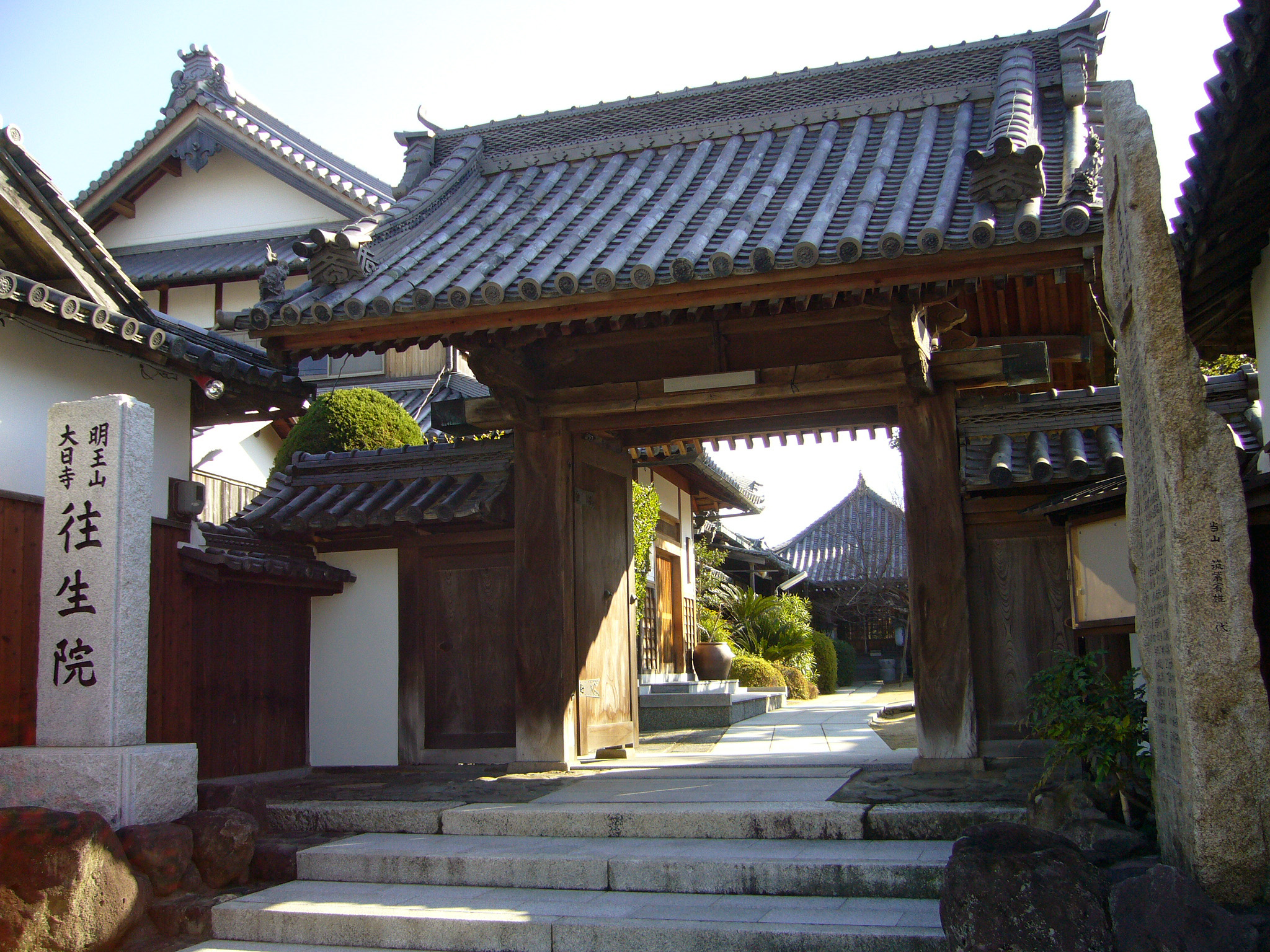 Ojoin in Sennan, Osaka, Japan